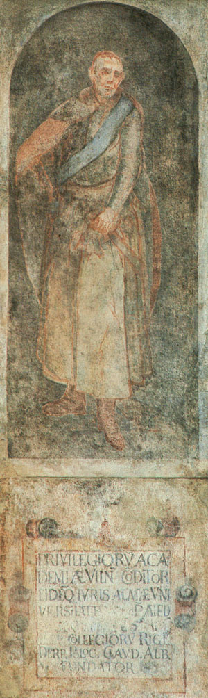 Беларуская (тарашкевіца): Партрэт Яна Караля Хадкевіча (Jan Karal Chadkievič), фрэска ў Віленскім унівэрсытэце